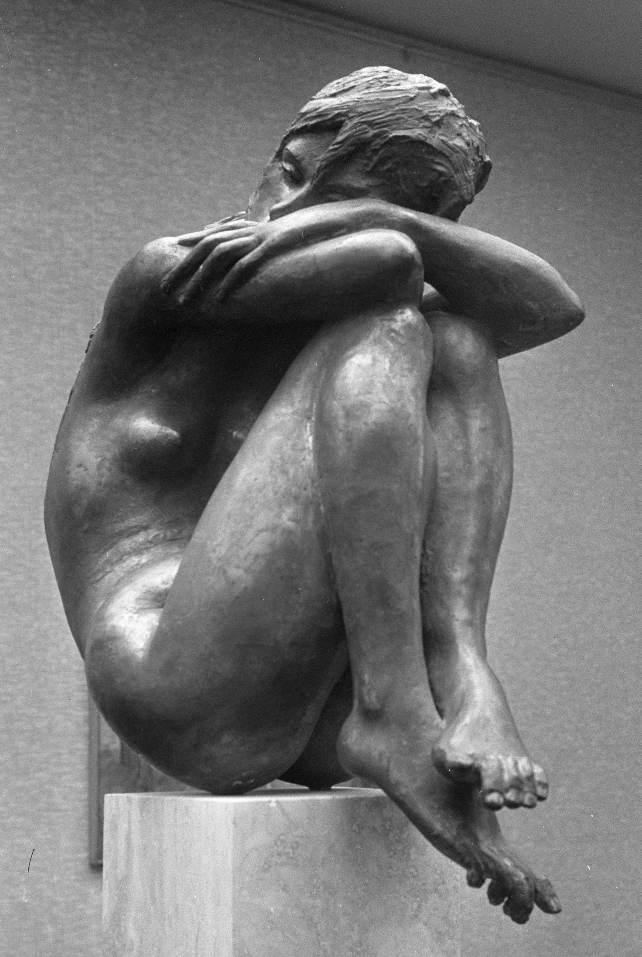 Amerikaanse tentoonstelling in Amsterdam. Een bronzen beeldje "Zittende Eva" van Elbert Weinberg